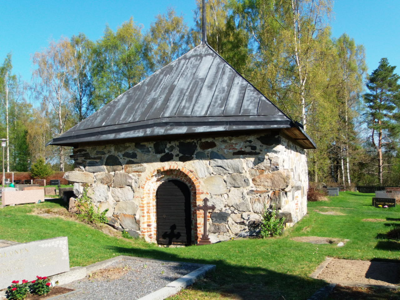 Vesilahden hautausmaa